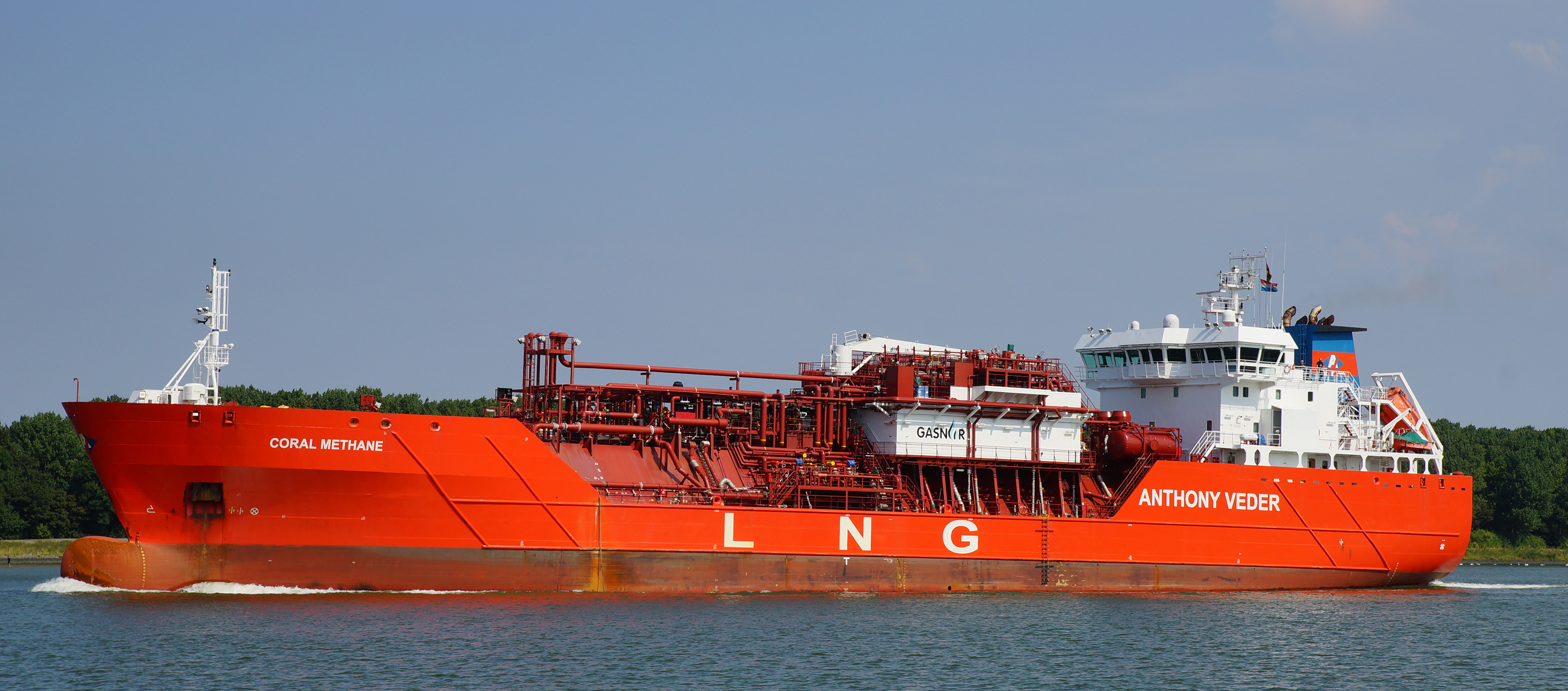 Nieuwe Waterweg